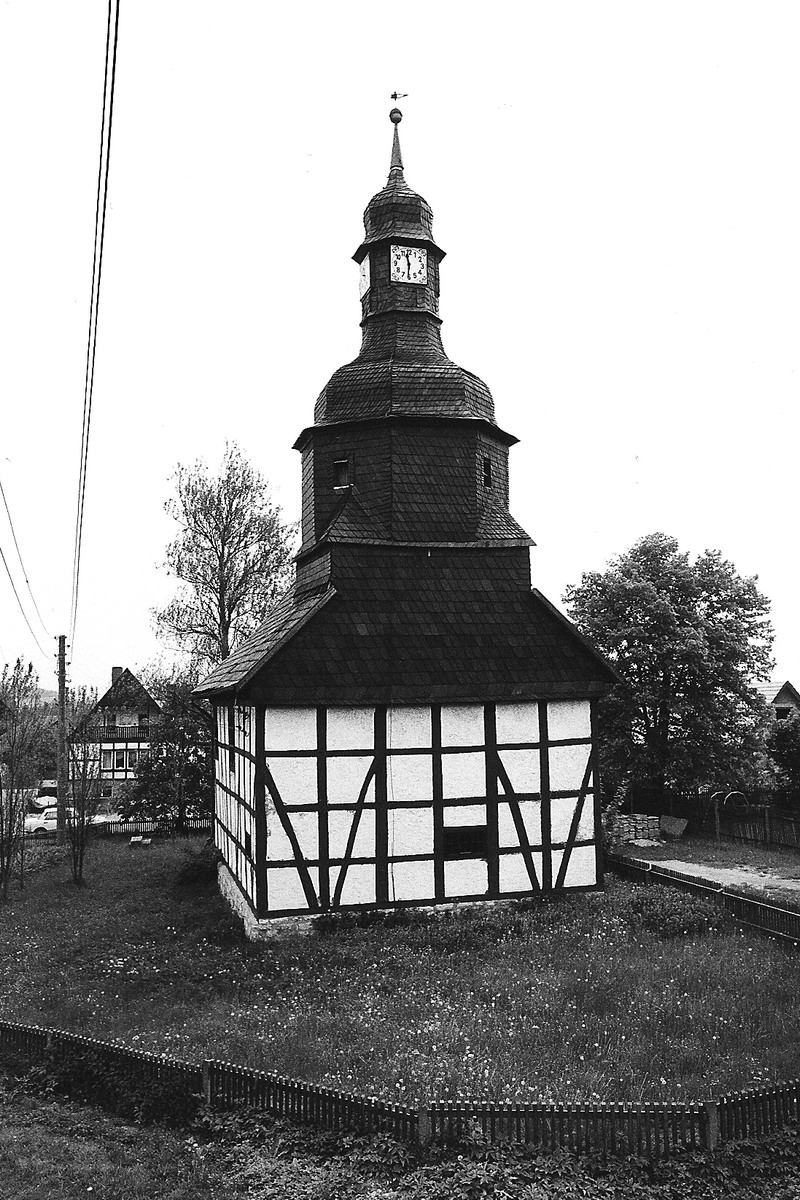 Trinitätiskirche, Hauröden, Bischofferode, Thüringen